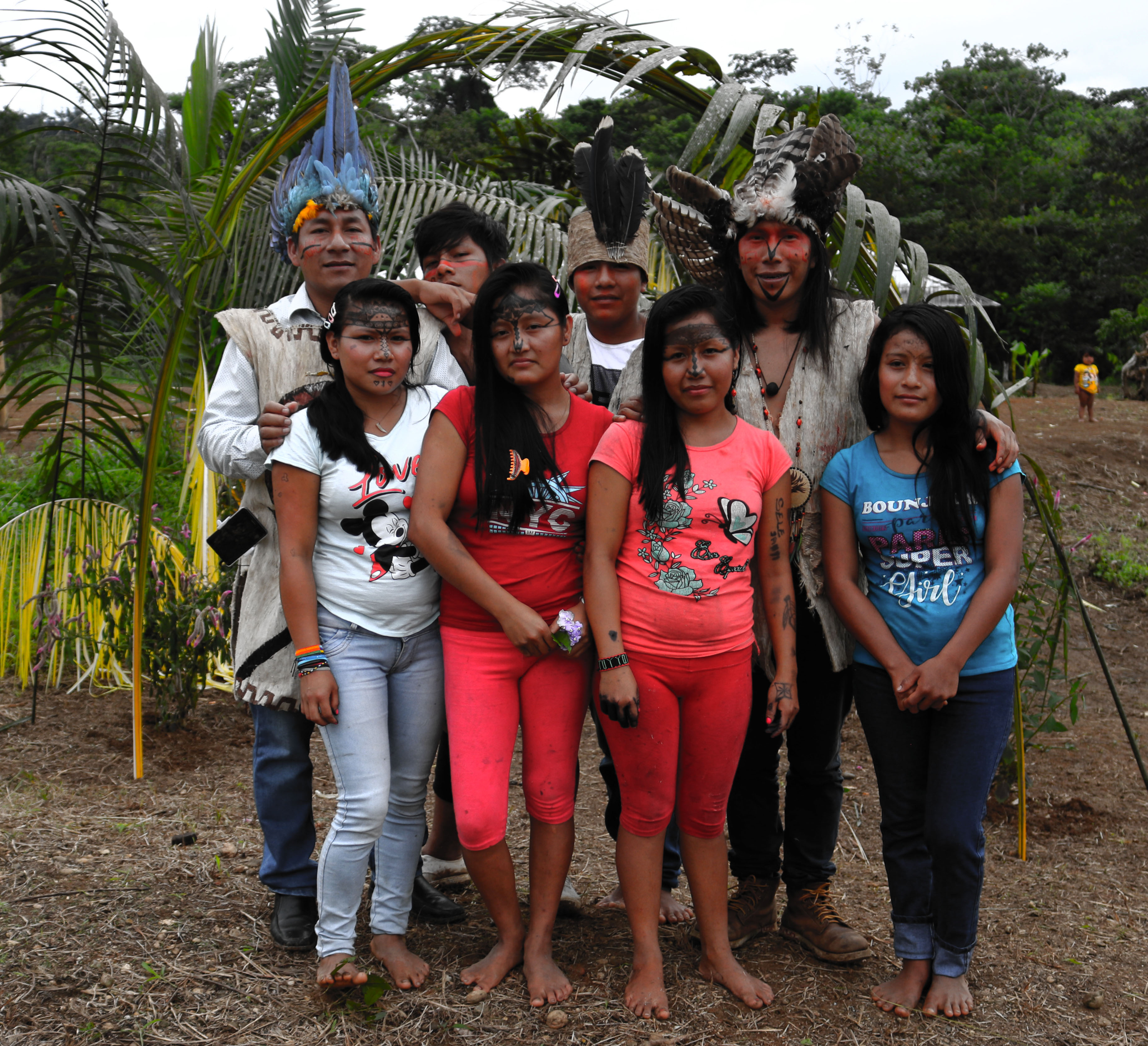 Familia sapara foto tomada en la comunidad Jandiayaku a la nueva generación.